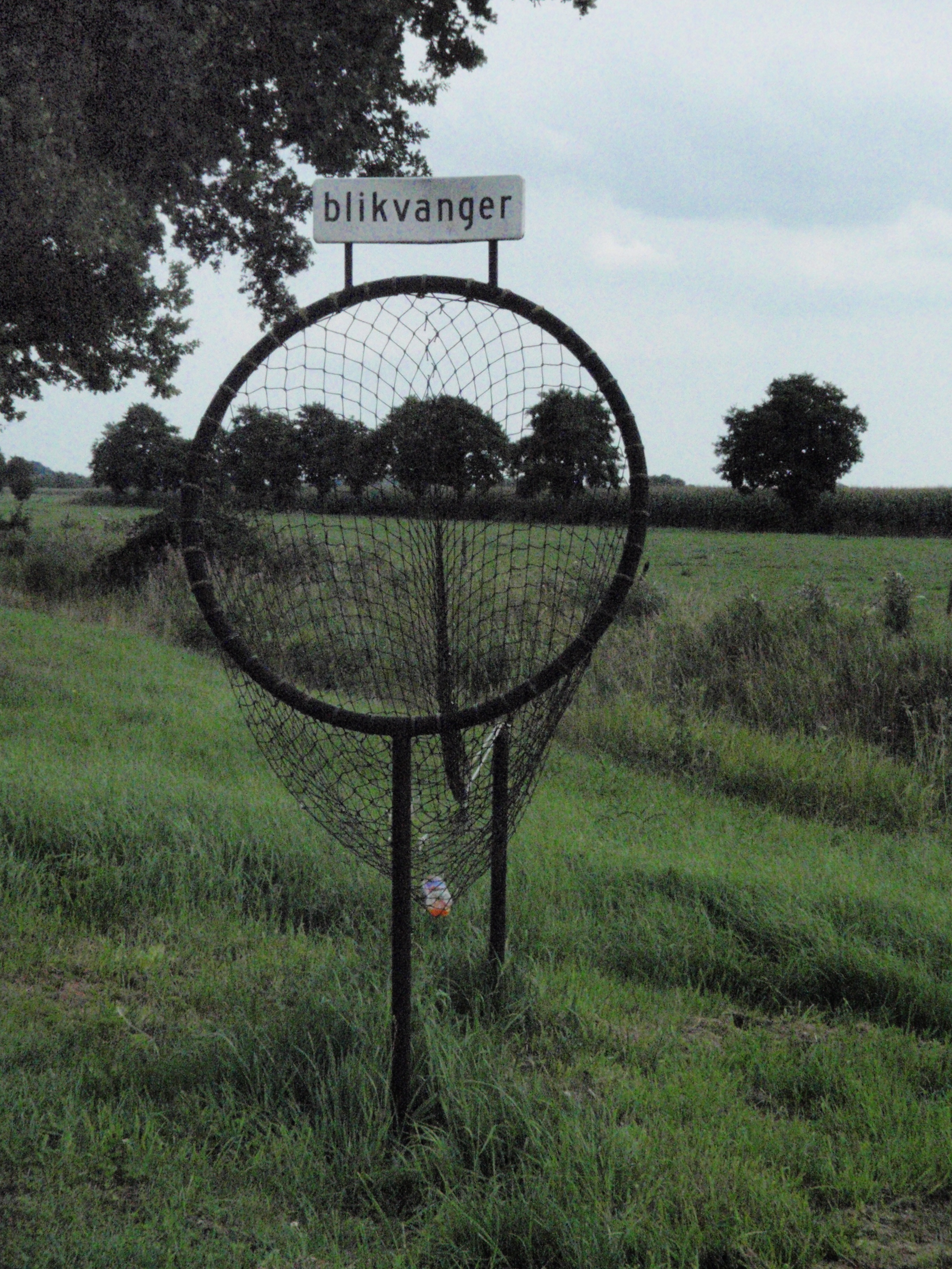 Blikvanger